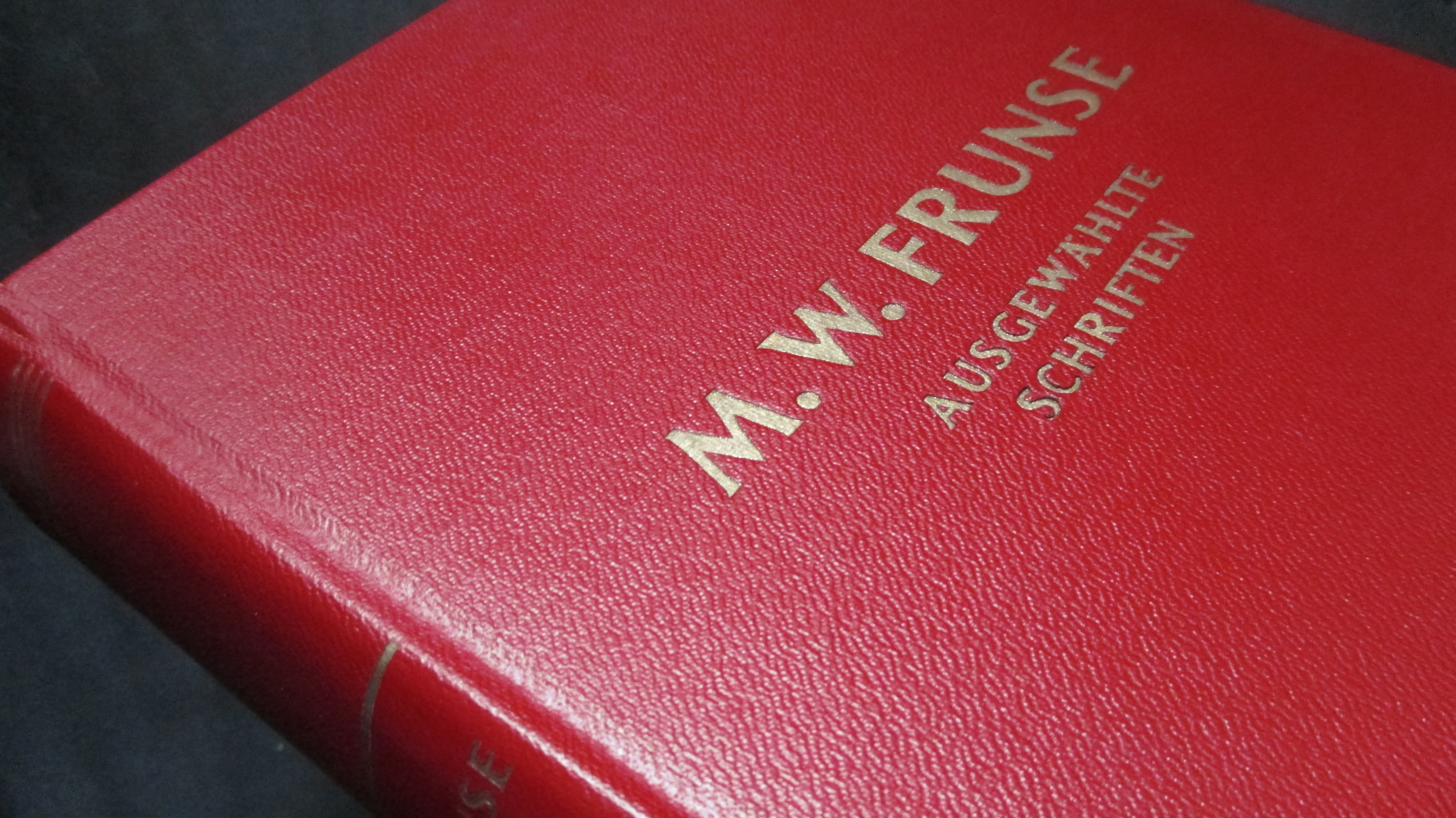 Bucheinband_M.W.Frunse_Ausgewählte Schriften_Deutsche Erstausgabe_Verlag des Ministeriums des Inneren_DDR